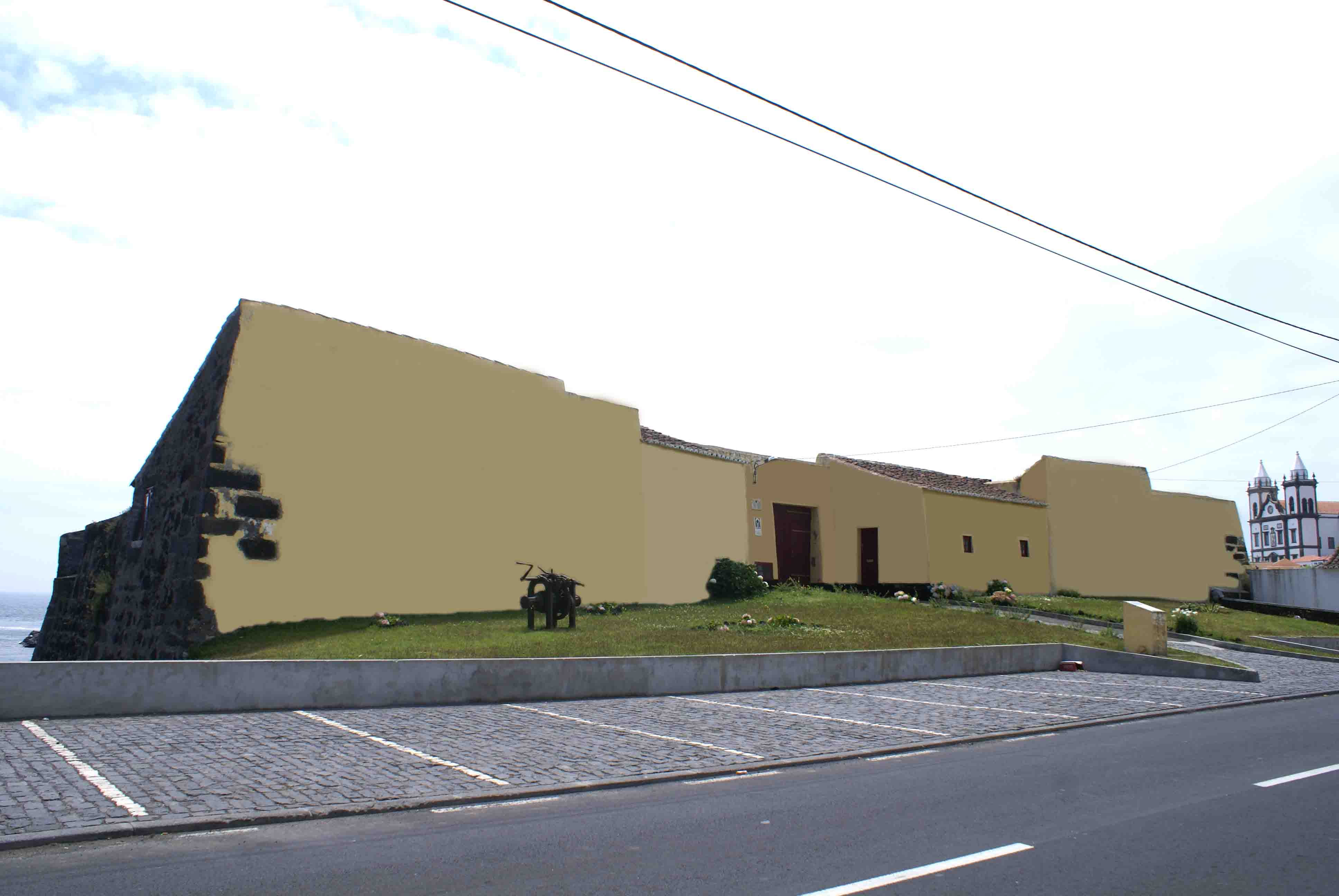 Forte Grande, São Mateus da Calheta, ilha Terceira, Açores, Portugal, Açores, Portugal.